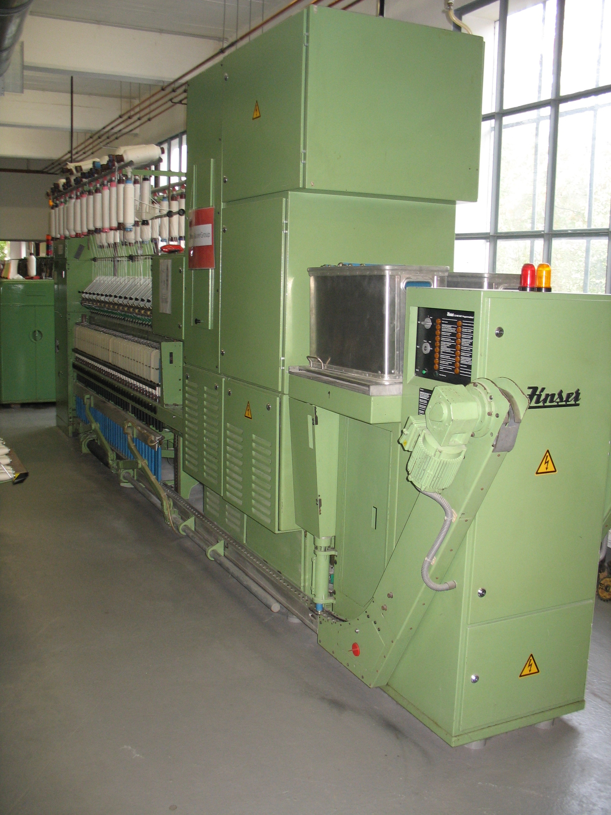 Ringspinnmaschine mit Doffer